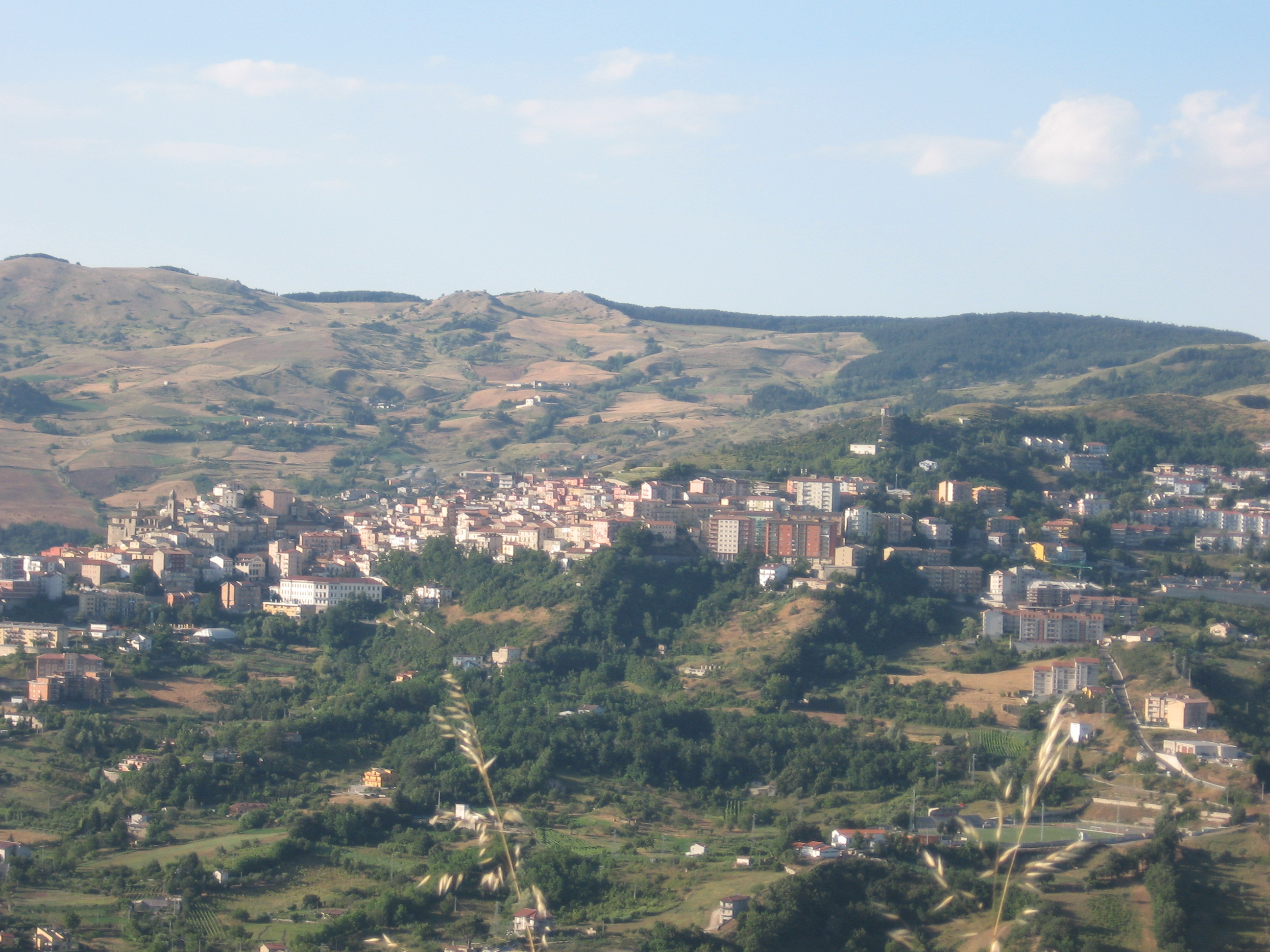 Panorama della città di Avigliano(Pz)